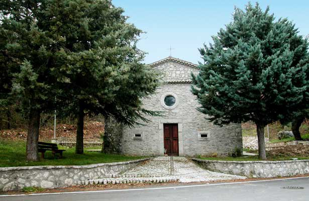 SANTUARIO LOCALITA' MADONNADELL'ASSUNTA